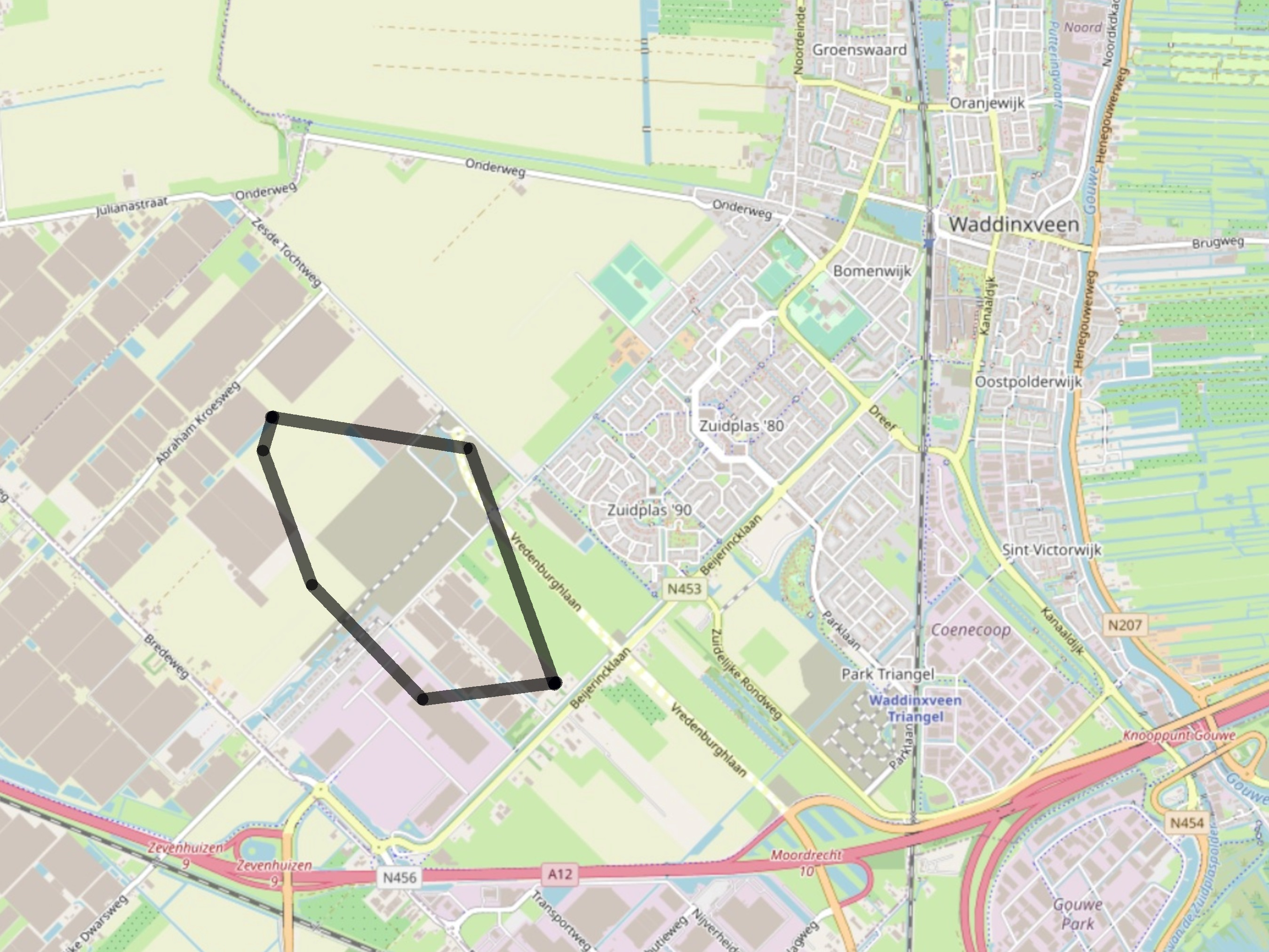 Ligging van het voormalige perceel Coenecoop in de Zuidplaspolder te Waddinxveen